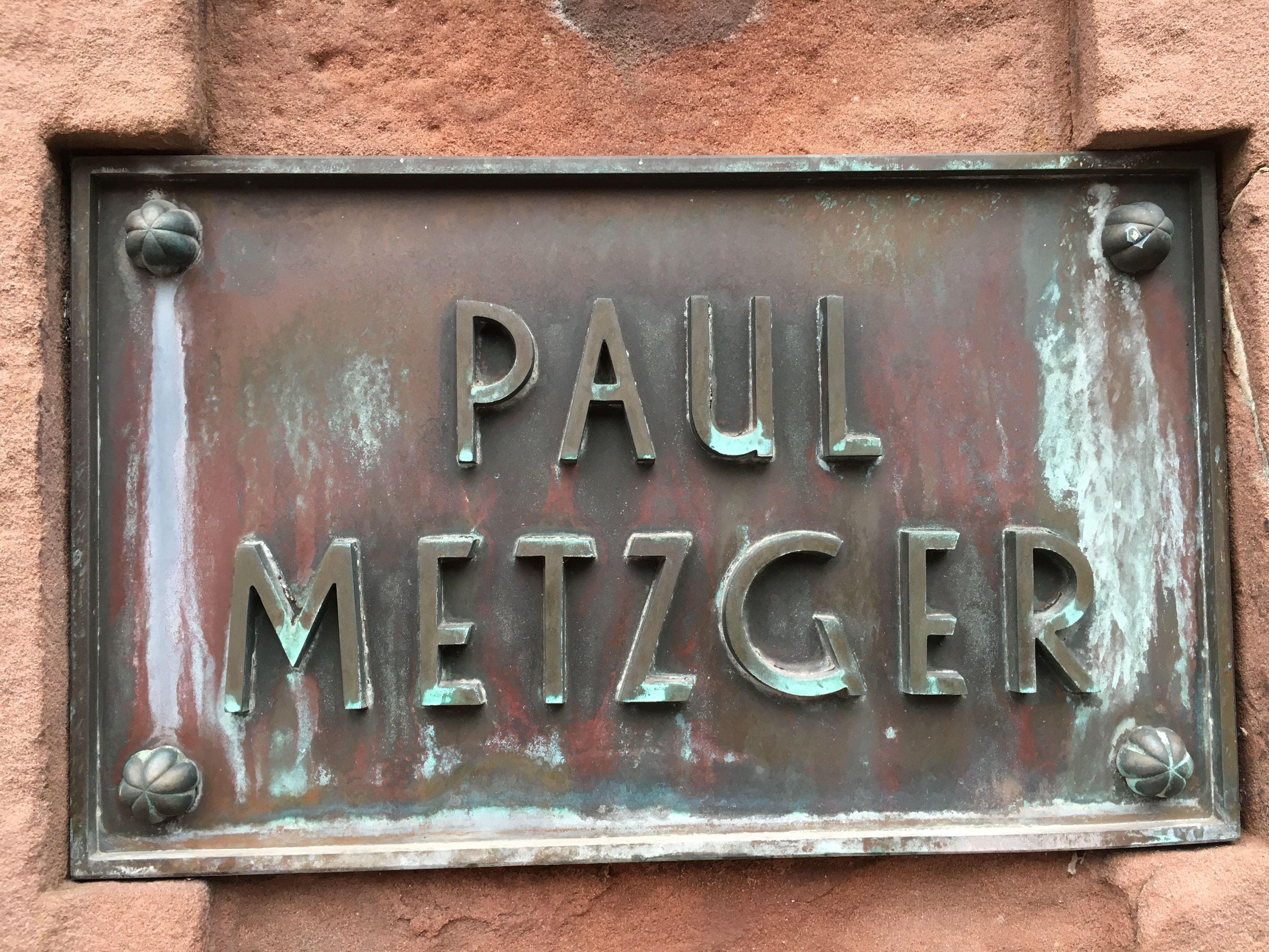 Paul Metzger